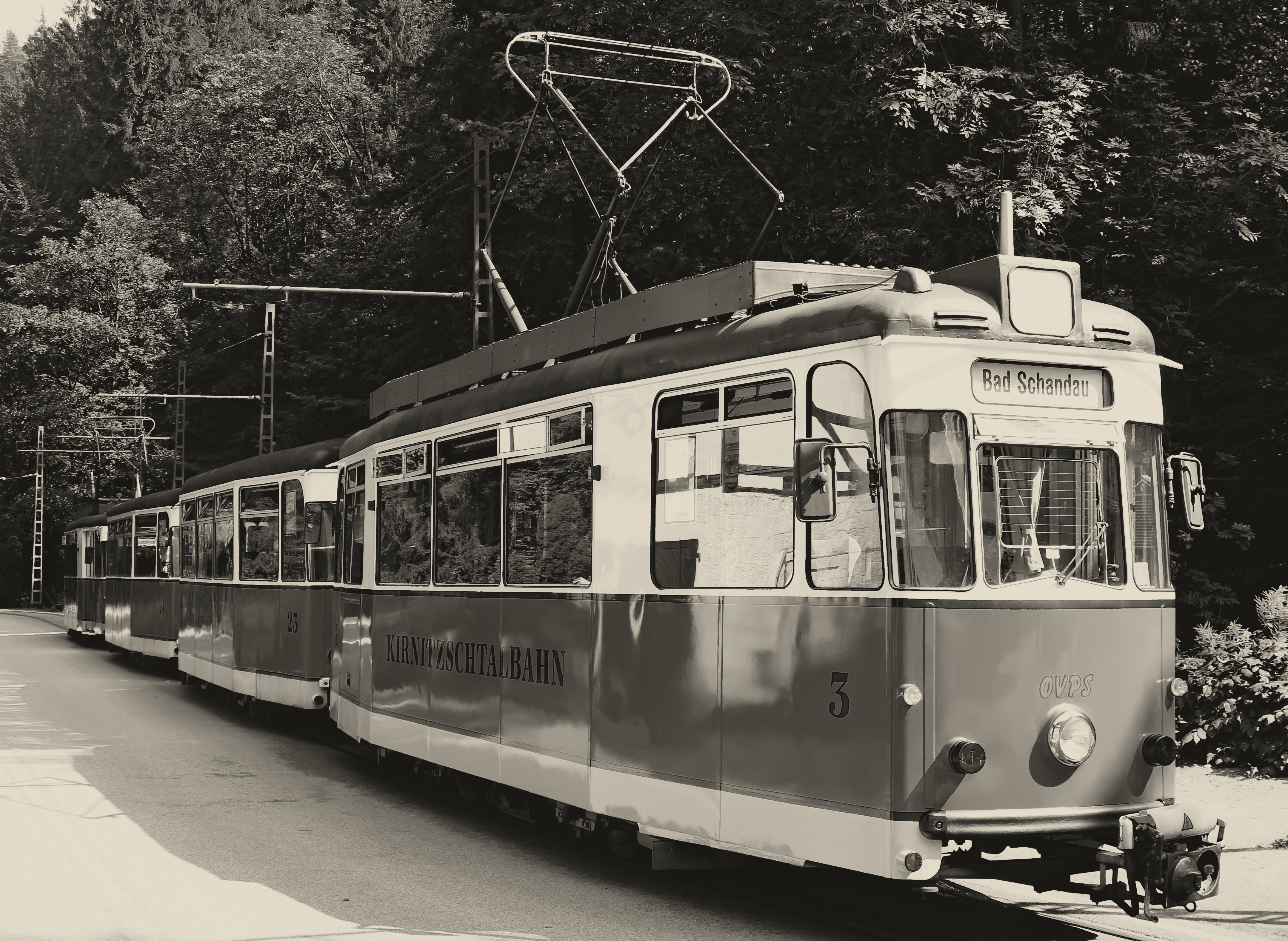 Tramvaj Křinické dráhy na konečné u vodopádu